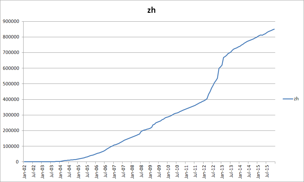 中文維基百科條目數增長圖，數據採用en:Wikipedia:Multilingual statistics和pl:Wikipedia:Podstawowy_ranking_międzyjęzykowy。